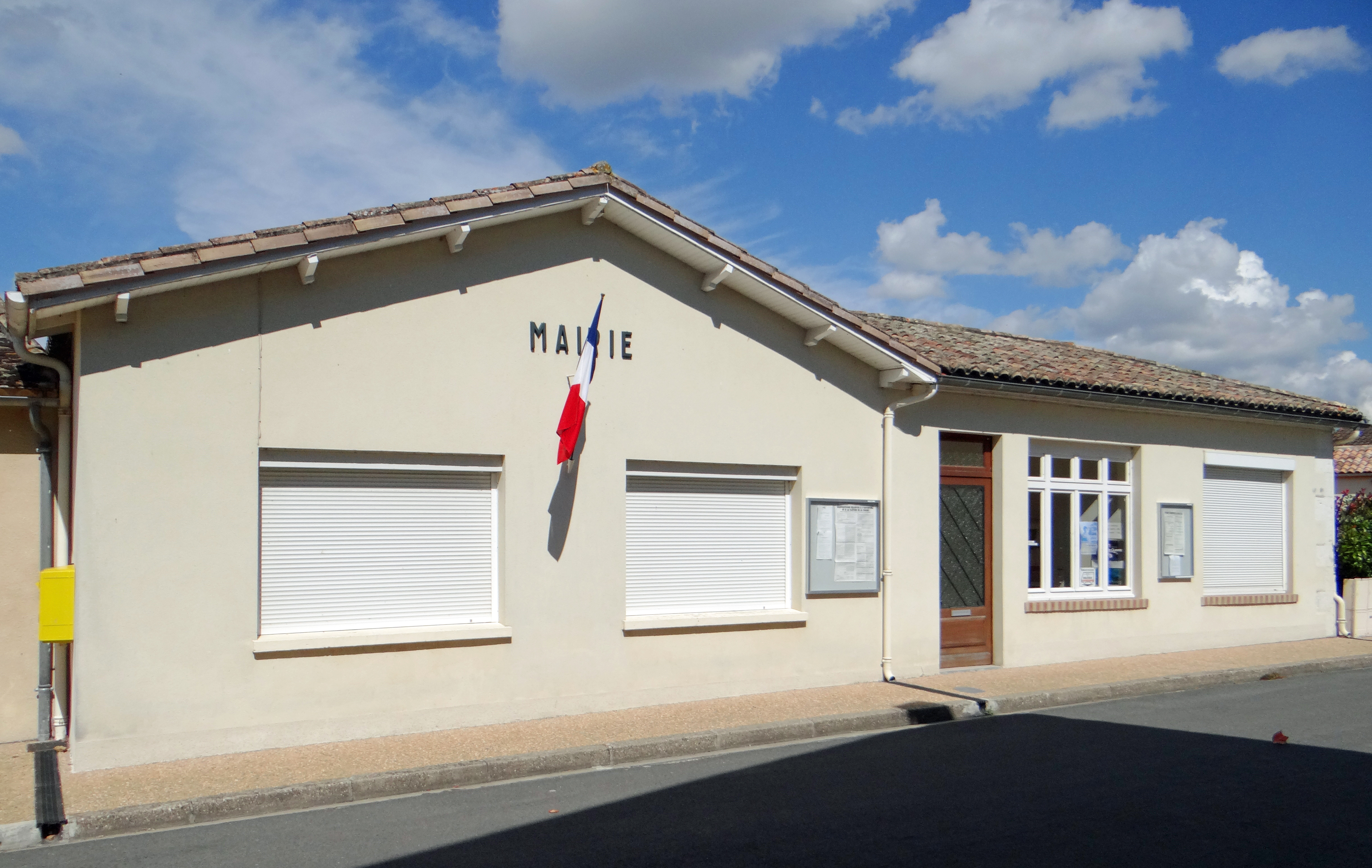 Saint-Quentin-du-Dropt - Mairie